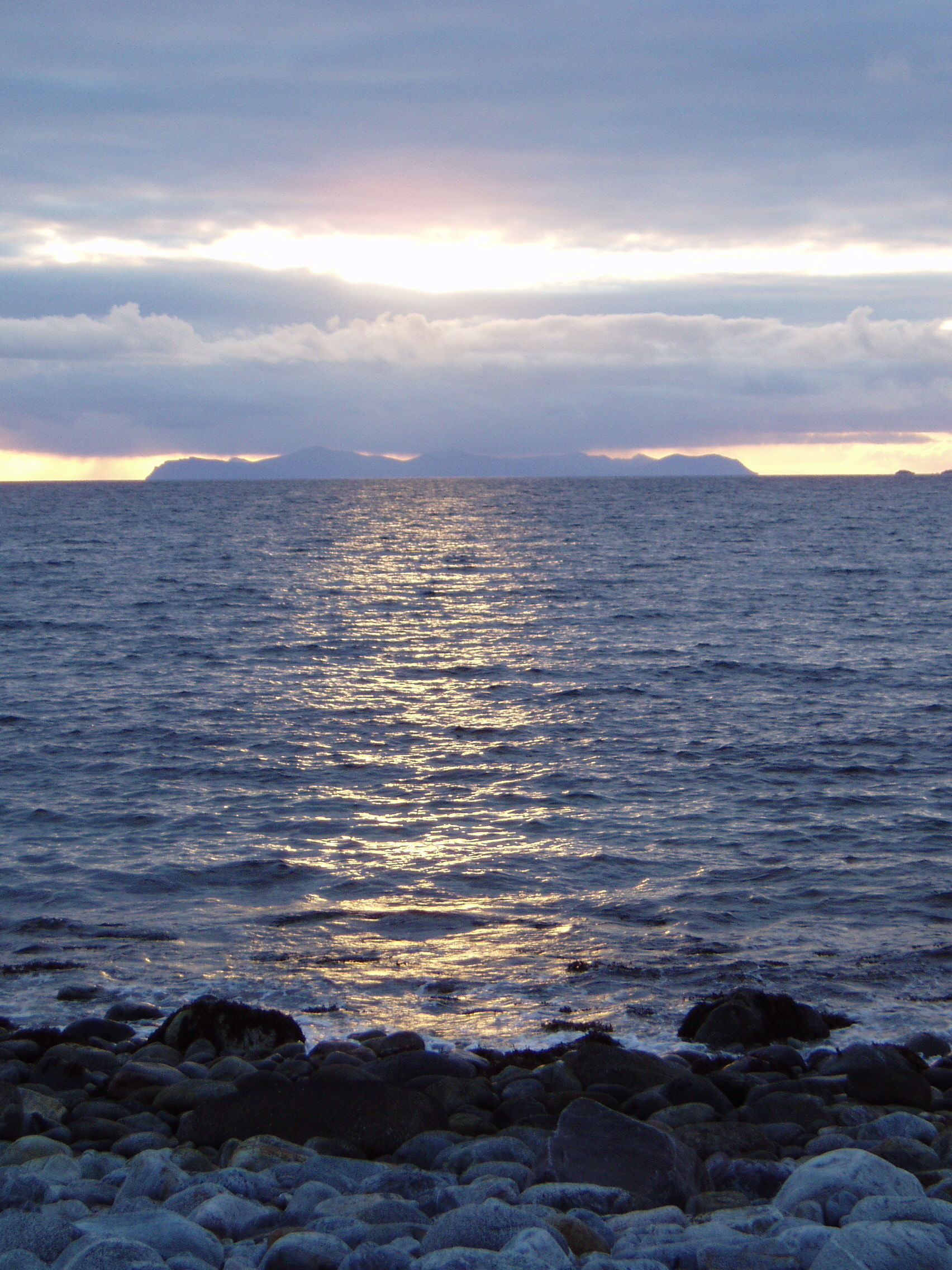 Andøya sett fra Nupen i Kvæfjord. Andfjorden.